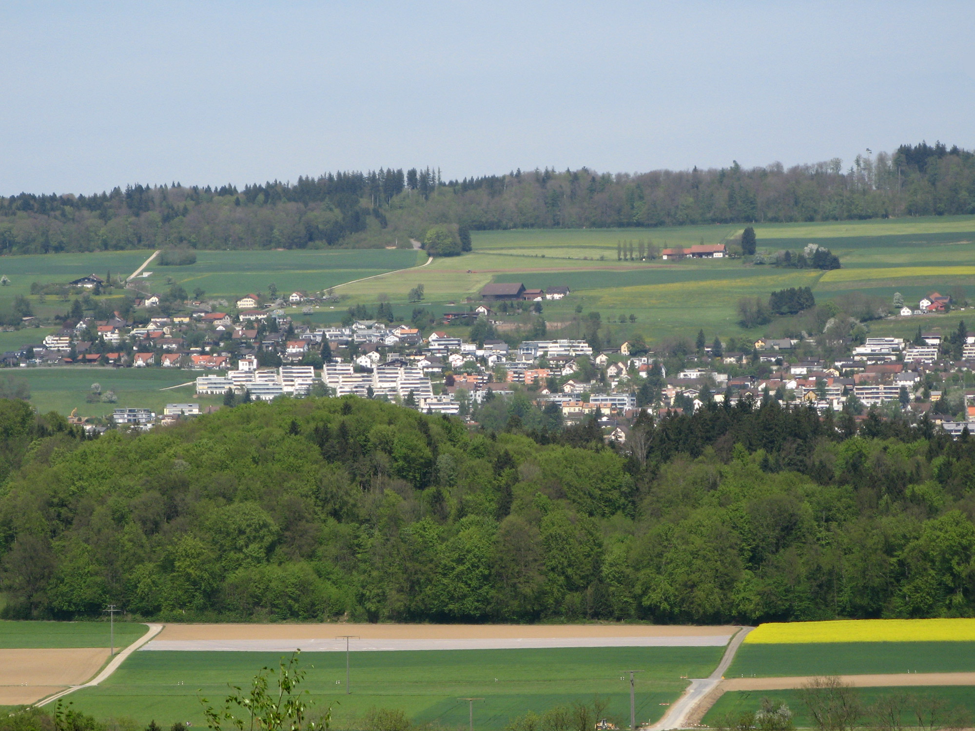 Ansicht von Nieder- und Oberrohrdorf, aufgenommen oberhalb von Tägerig